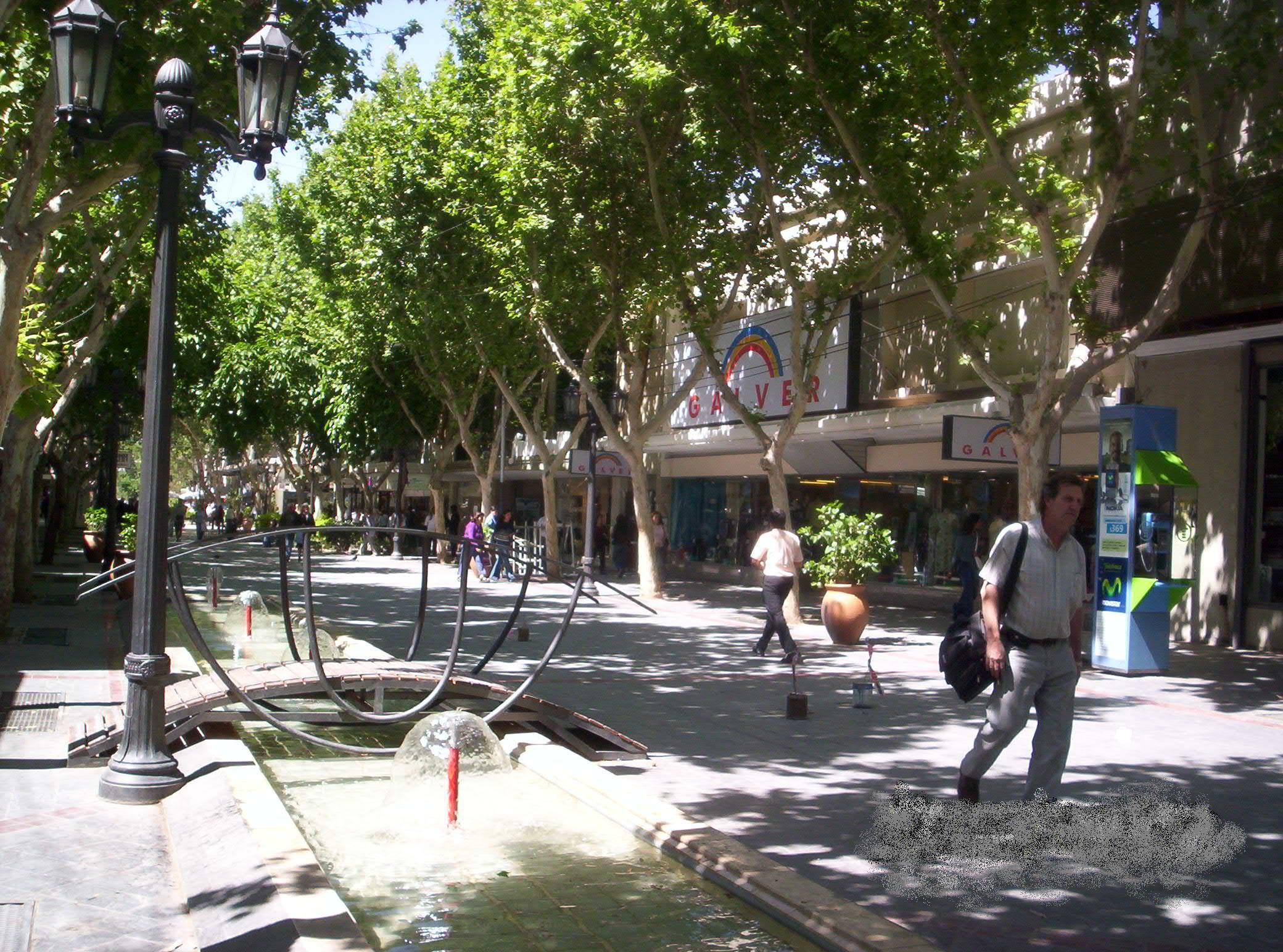 Fotografía de la Peatonal Tucumán en la Ciudad de San Juan